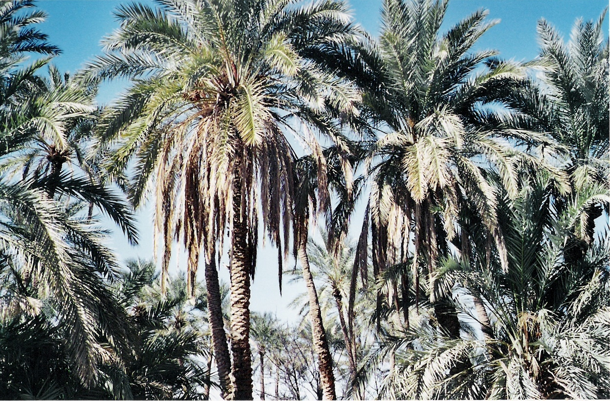 Palmerais à Filiach en Algérie.